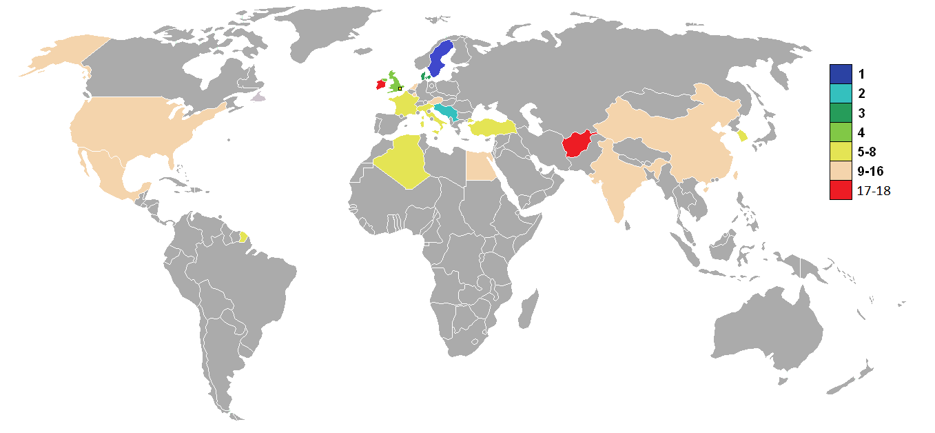 Classement des pays ayant participé aux JO 1948, en football.